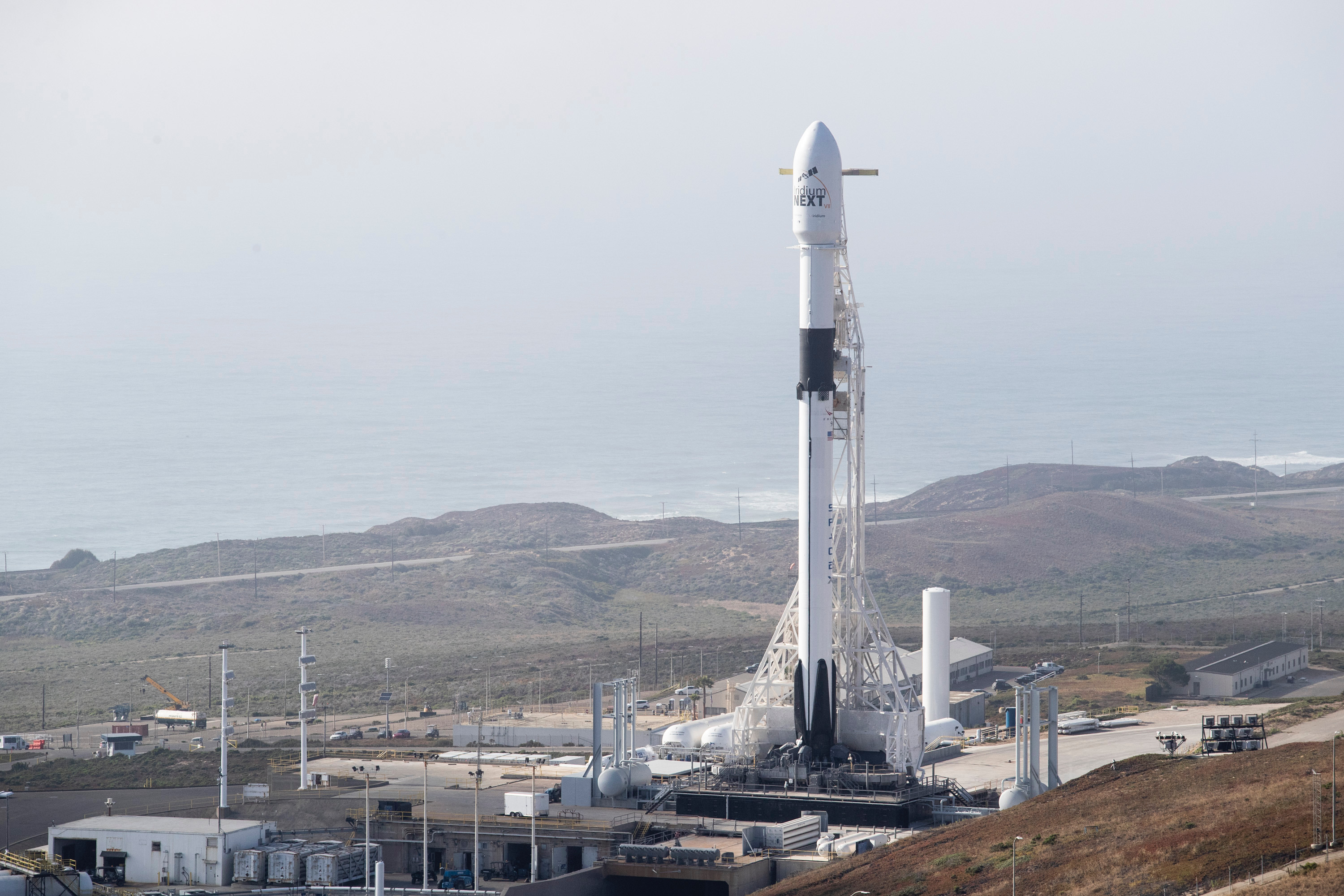 Iridium-7 Mission